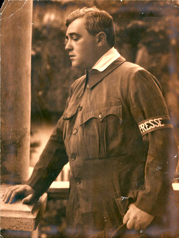 Molnár Ferenc író haditudósítóként (ismeretlen fényképész felvétele)